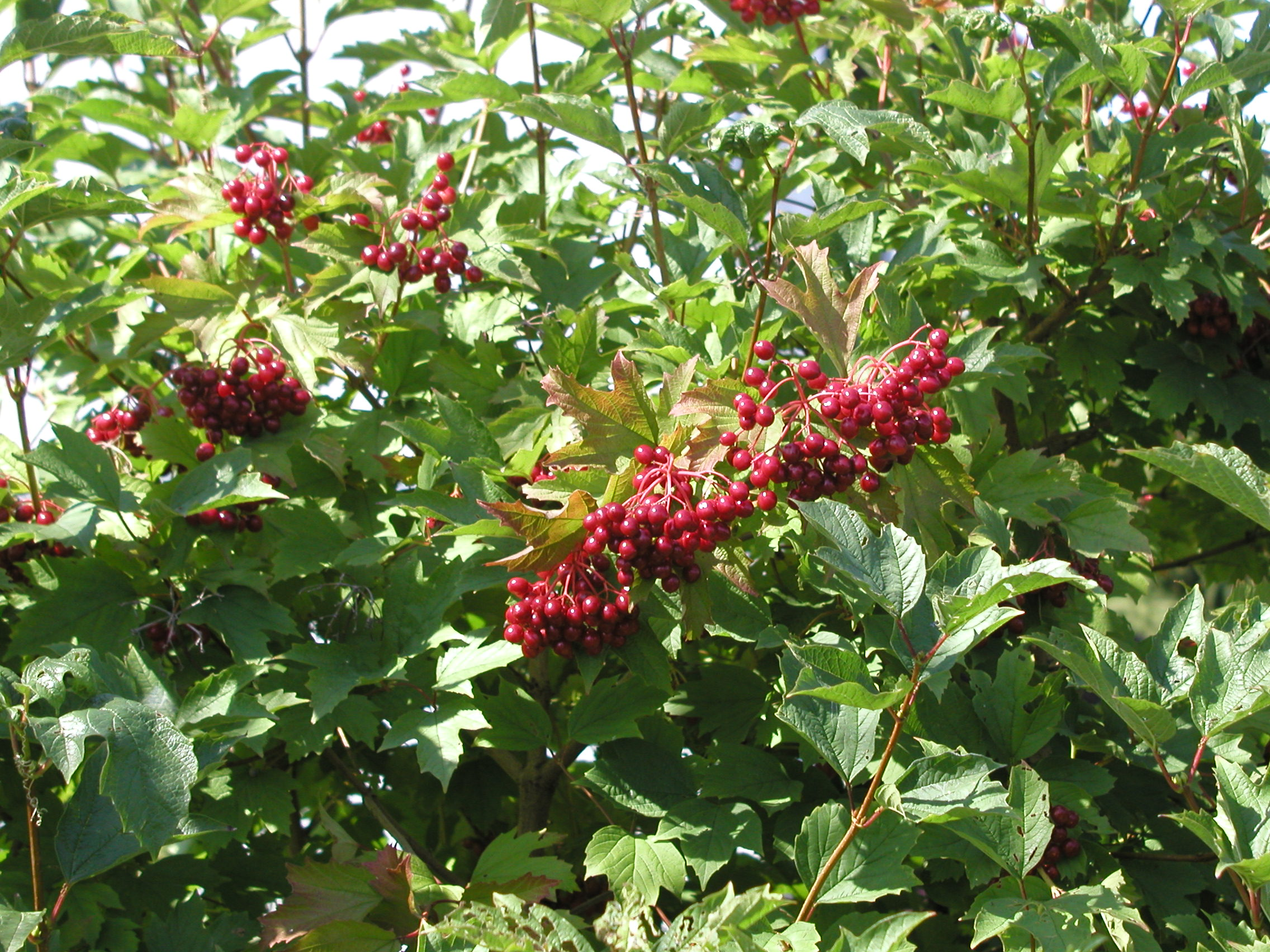 Viburnum opulus pl: Kalina koralowa